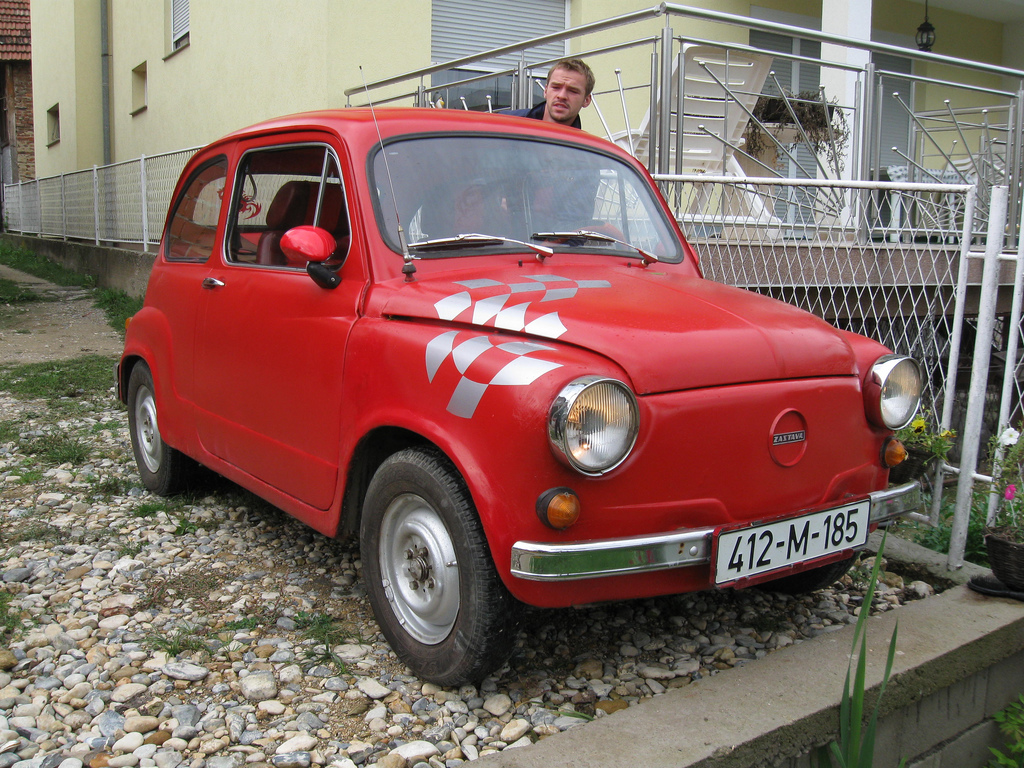 Red Zastava 750 or 850 in in Bosnia and Herzegovina.